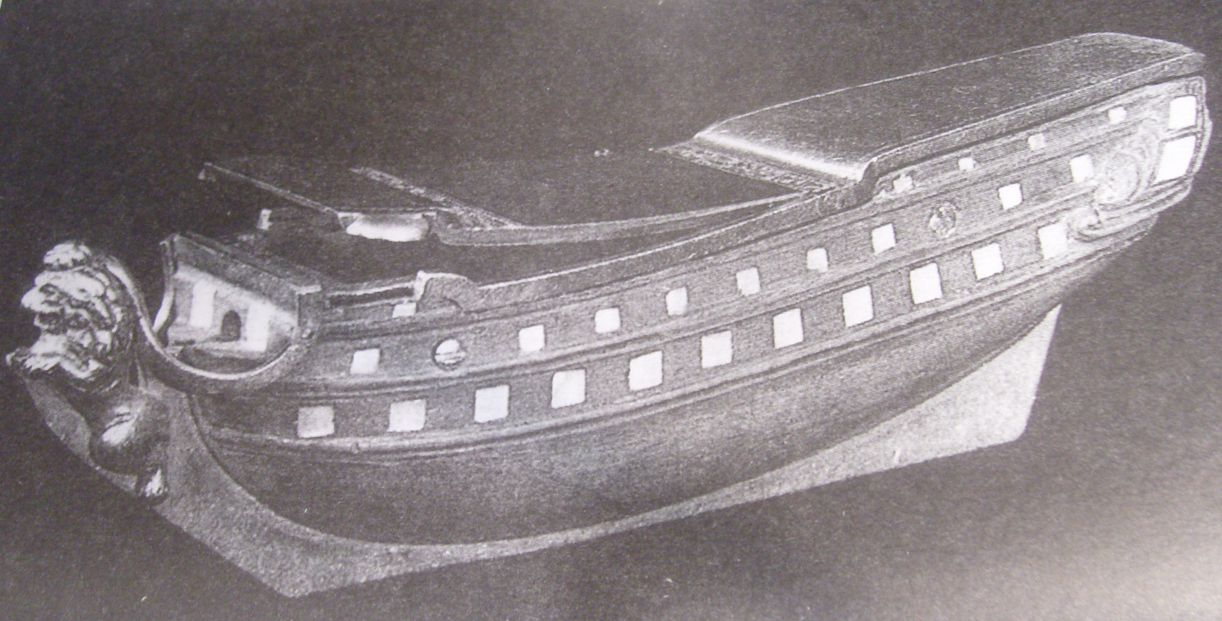 Табакерка из собрания Государственного Эрмитажа, около 1712 года. Изготовлена из орехового дерева, золота и перламутра, с резьбой и инкрустацией. Предположительно выполнена в форме 54-пушечного корабля "Полтава" (1712)